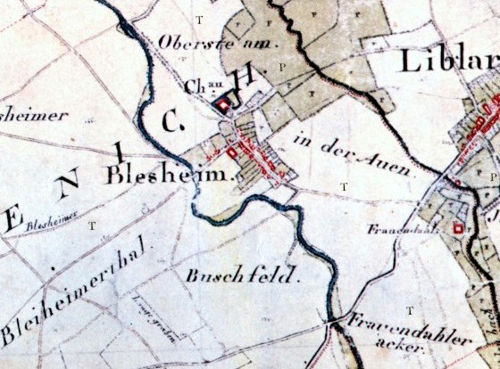 Kartenaufnahme der Rheinlande, Jean Joseph Tranchot und von Müffling 1803-1820. Kartenausschnitt der Region Lblar, Frauenthal, Blessem um 1807